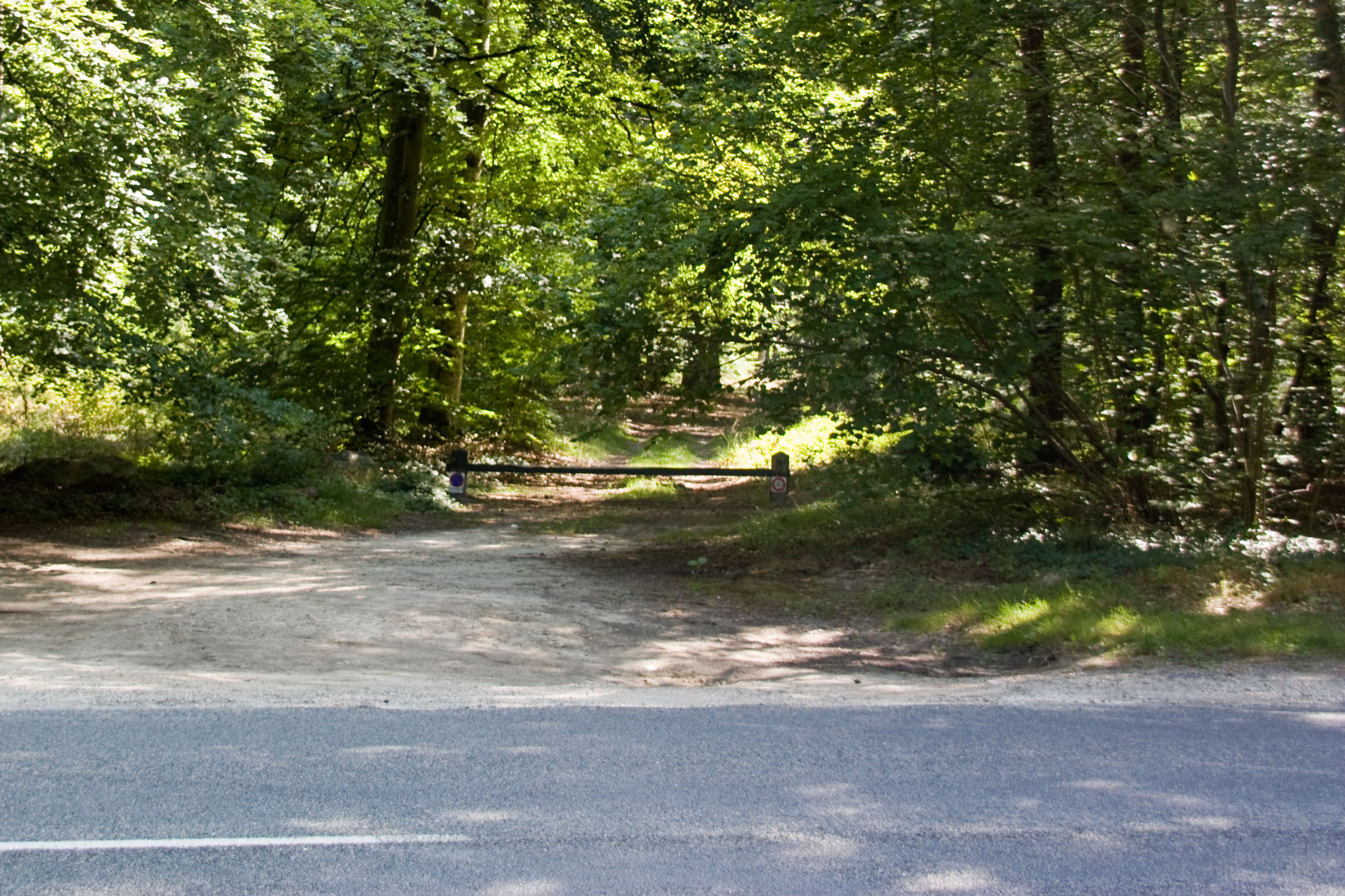 Accès à la halte de Fontainebleau - Forêt : Route de la Girolle à son origine sur la RD 116. Fontainebleau, Seine et Marne. France.